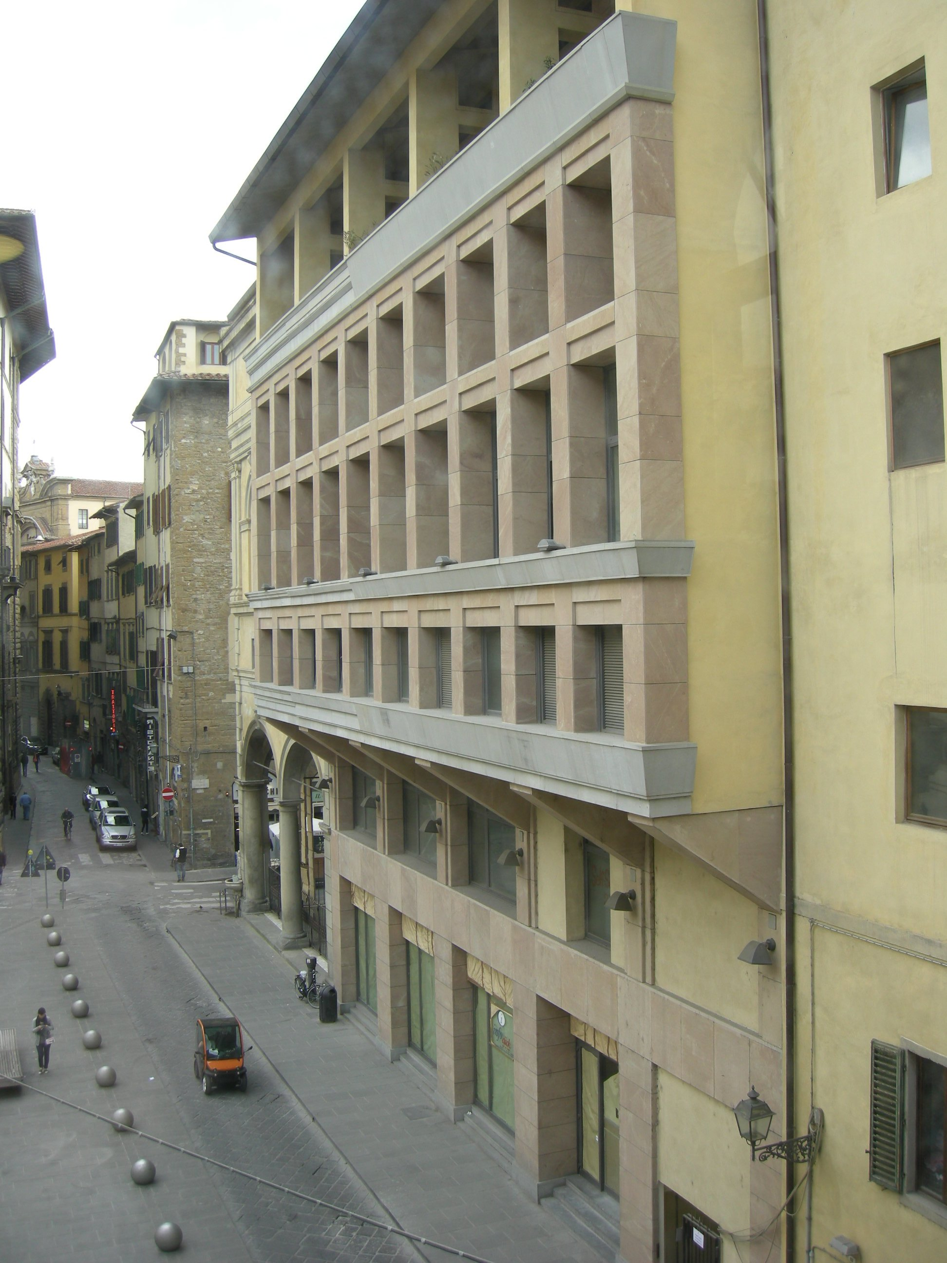 Ex-cinema capitol, fi